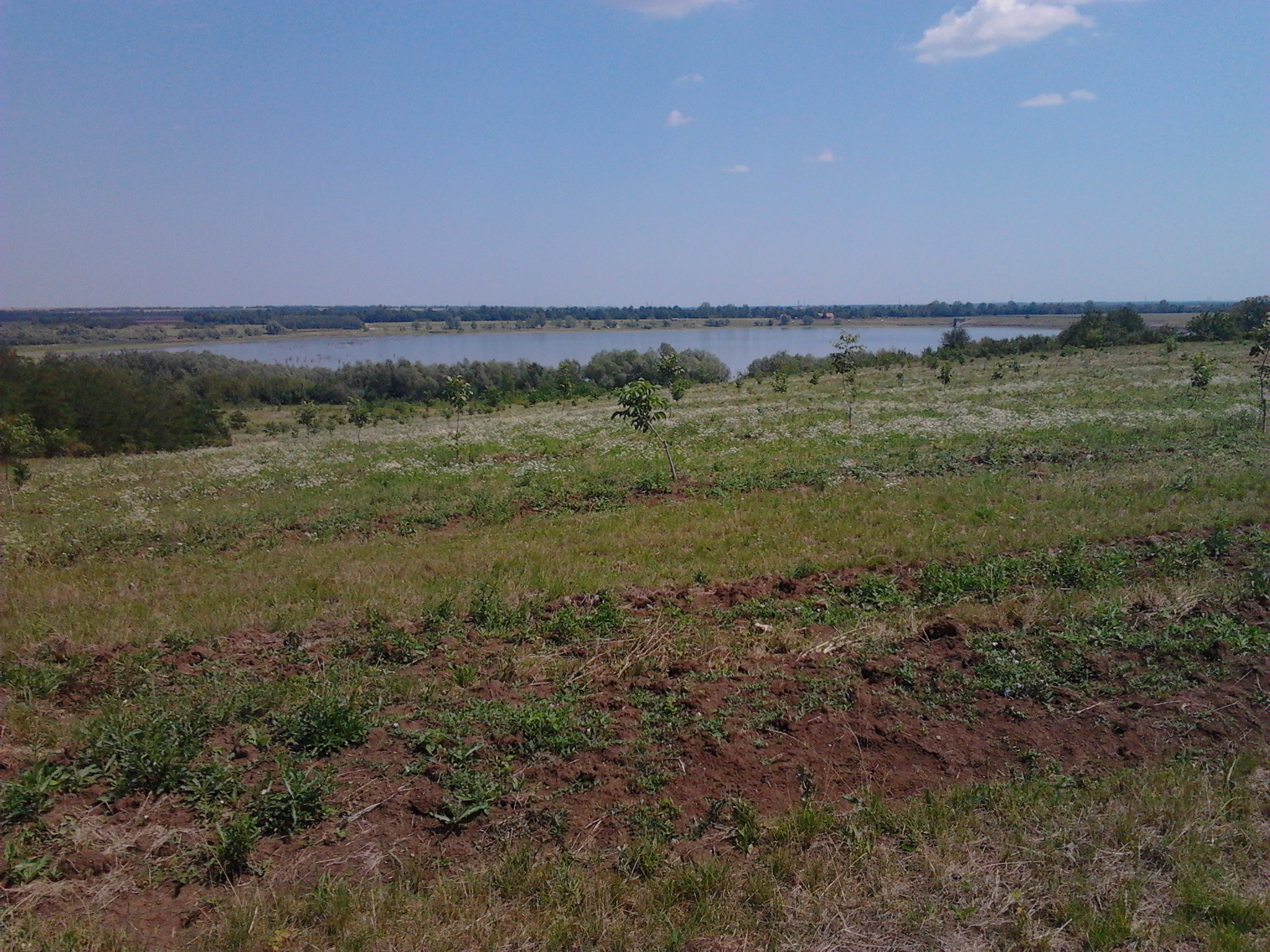 A Hór-völgyi víztározó látképe.